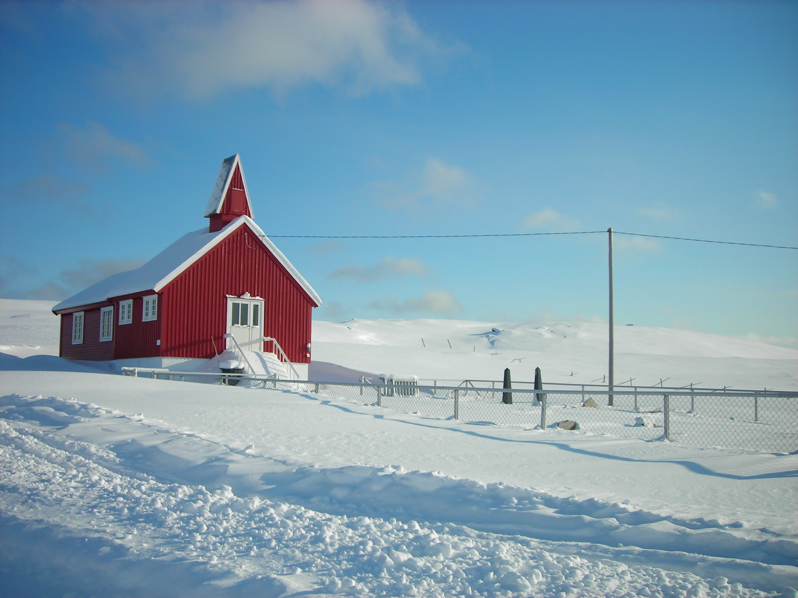 Repvåg kirke i Nordkapp kommune, Finnmark. Fotografert vinterstid.